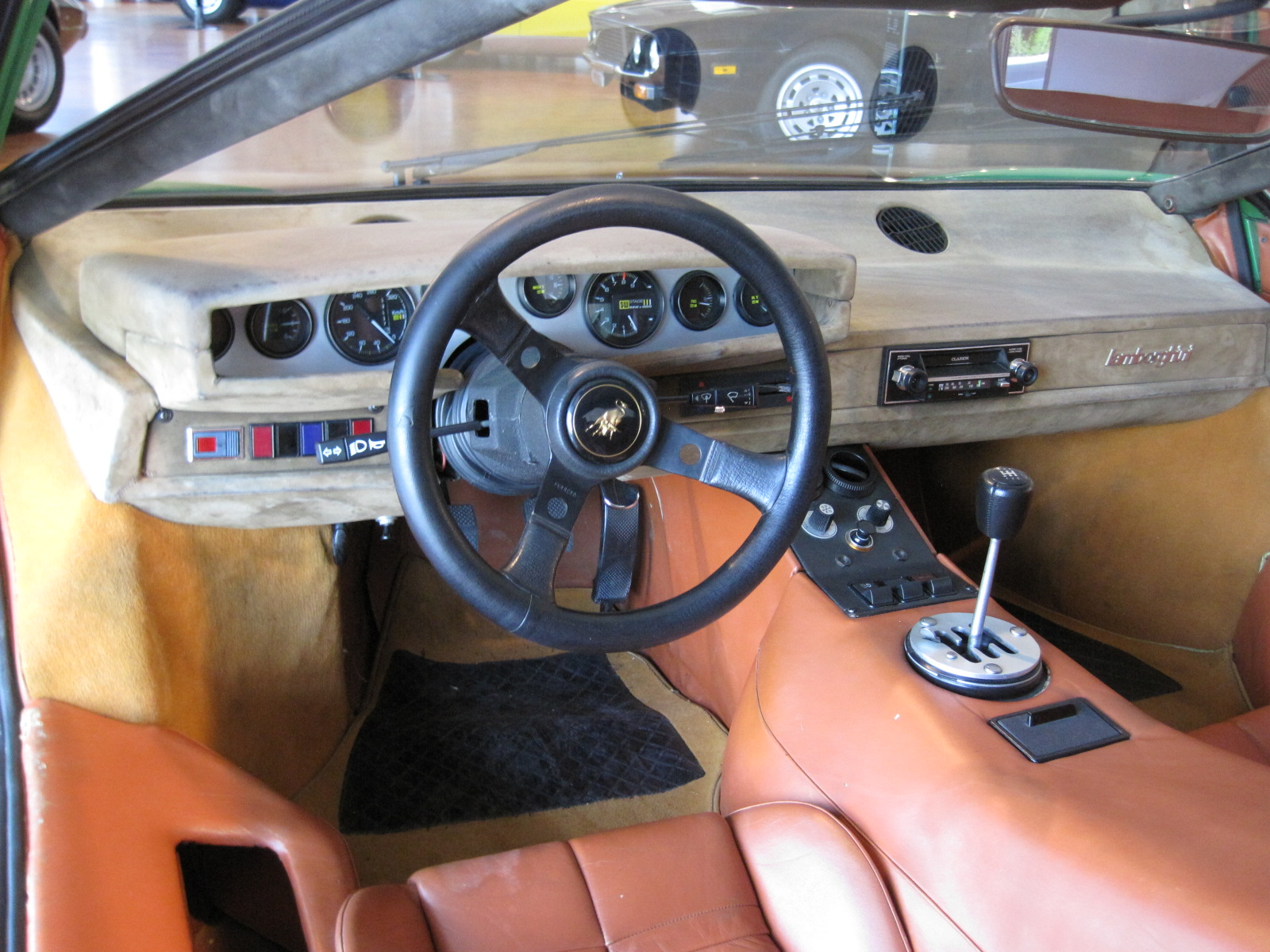 Musée Lamborghini - Countach